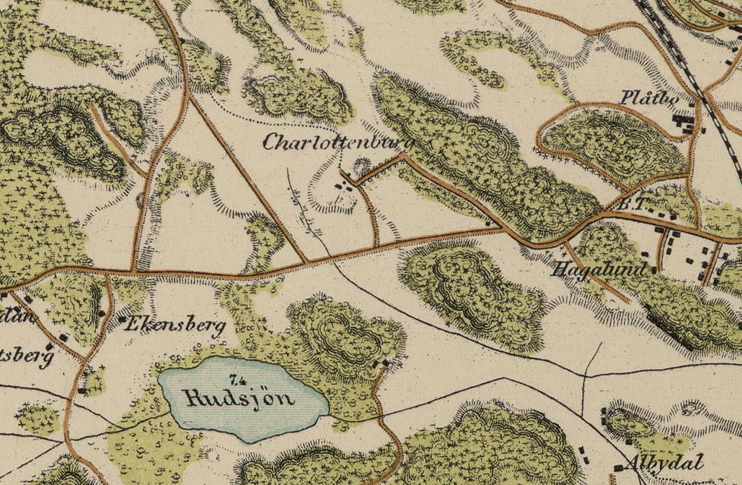 Trakten omkring Stockholm 1861 (Charlottenburg)